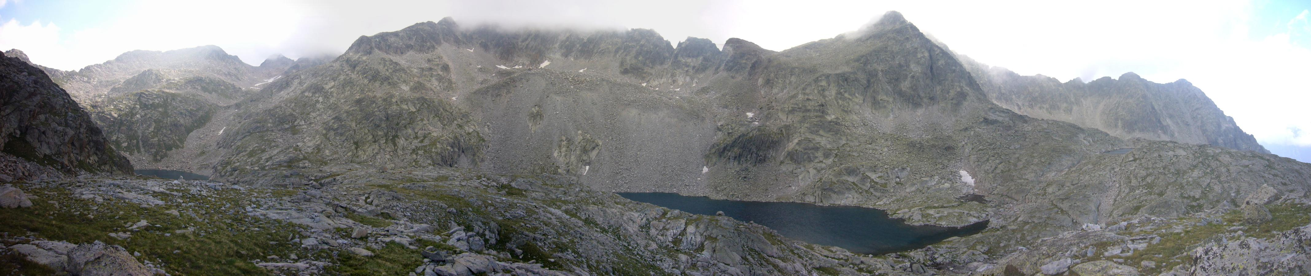 Pics meridionals de la Vall de Comalesbienes, vists des de la Vall de Comalesbienes; la Vall de Boí, Alta Ribagorça, Catalunya